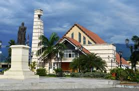 Plaza Bolivar de Nueva Bolivia